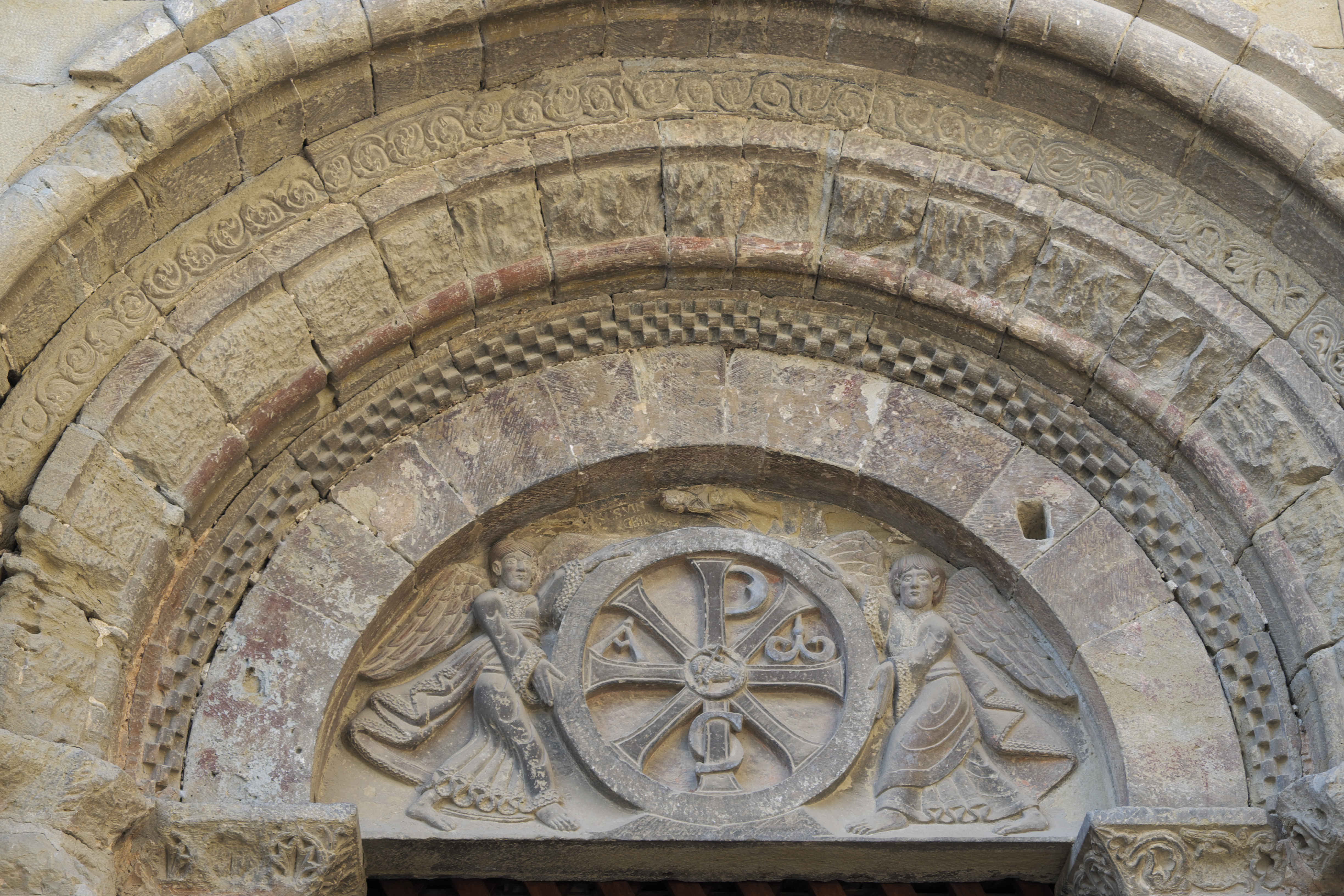 Katholische Pfarrkirche, ehemalige Benediktinerklosterkirche San Pedro el Viejo in Huesca in der Provinz Huesca (Aragón/Spanien), Tympanon des Hauptportals an der Nordfassade, Darstellung: Chrismon mit Alpha und Omega, seitlich Engel